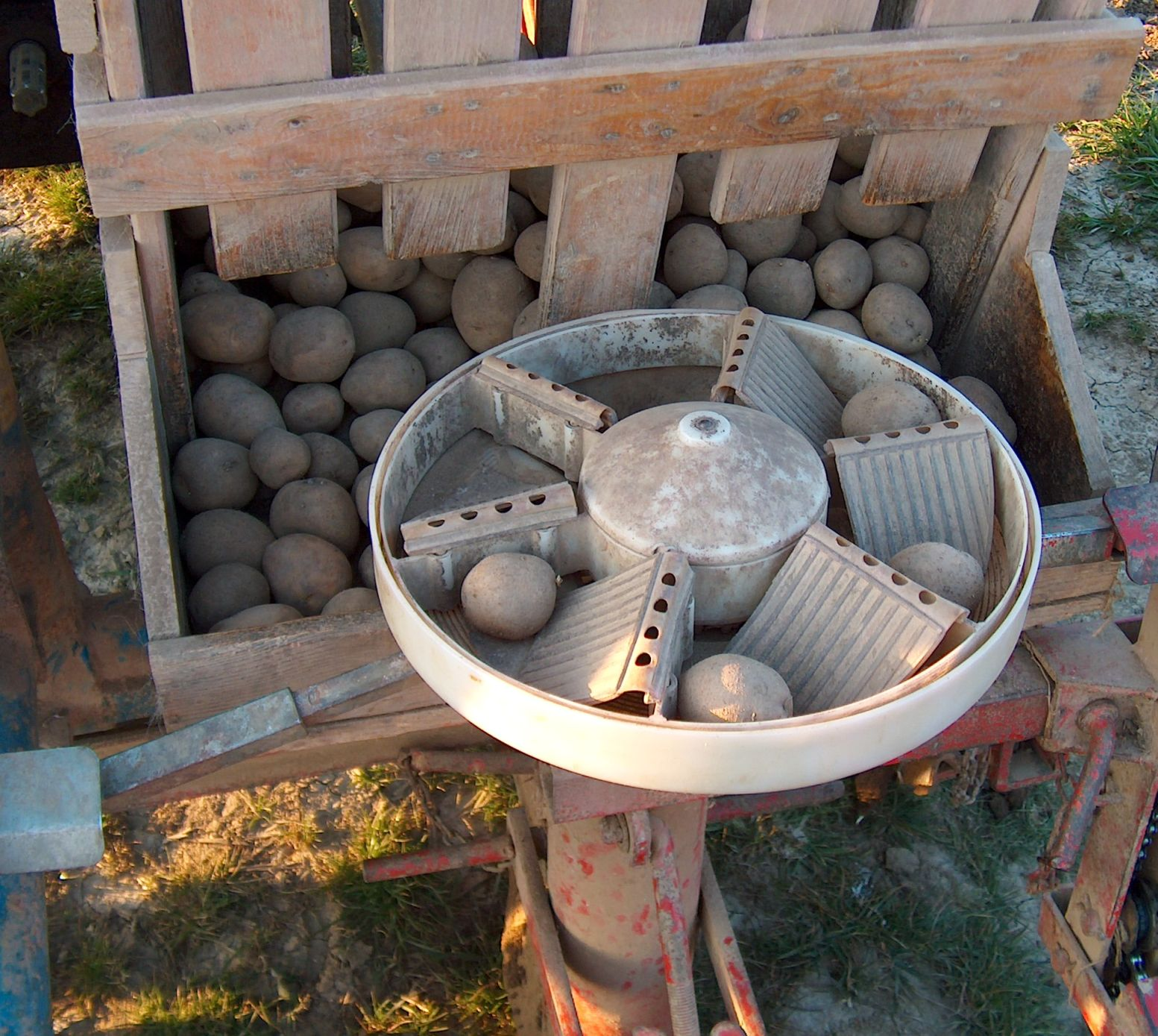 Kartoffellegemaschine